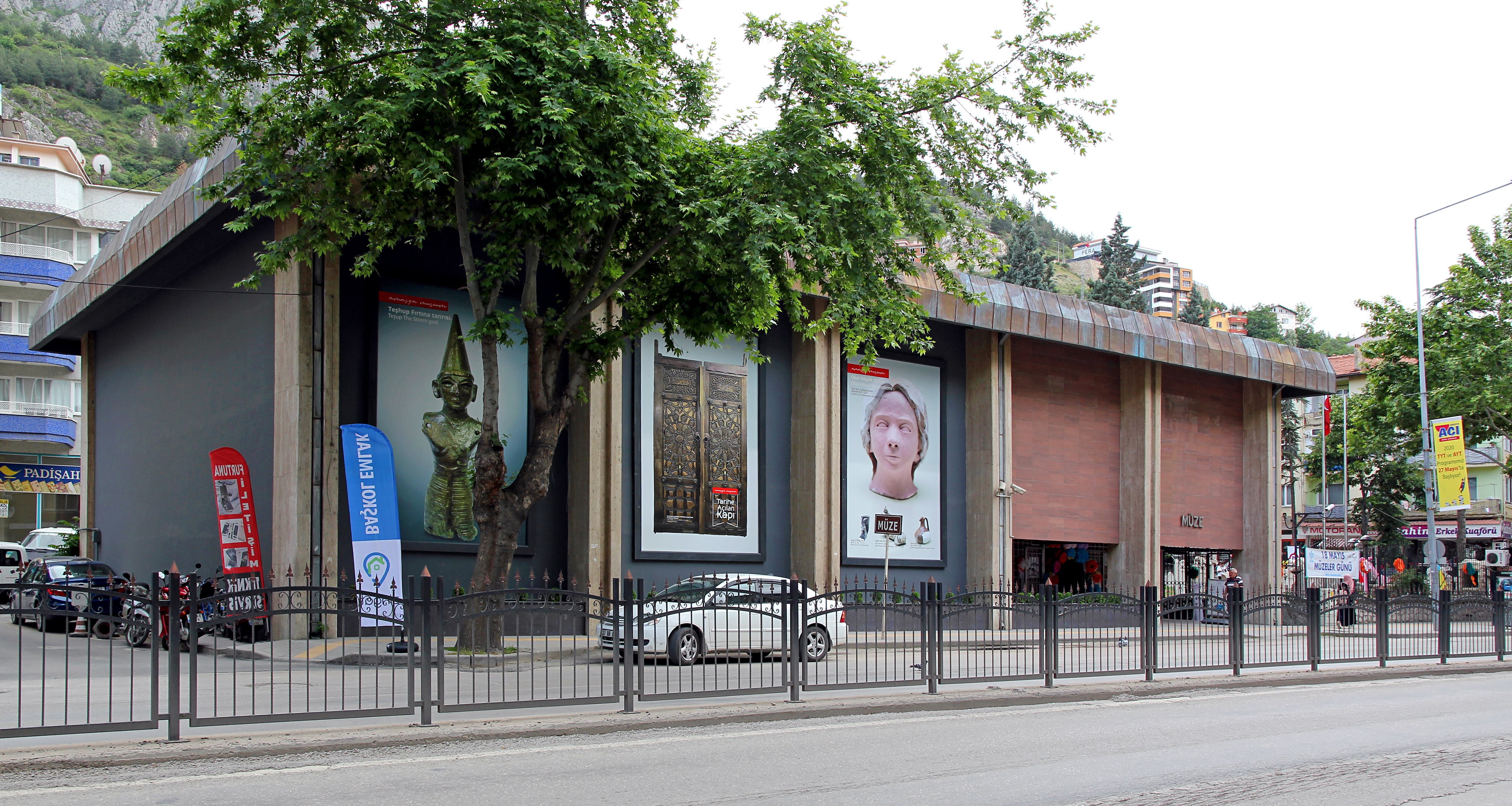 Archäologisches Museum von Amasya, Nordtürkei